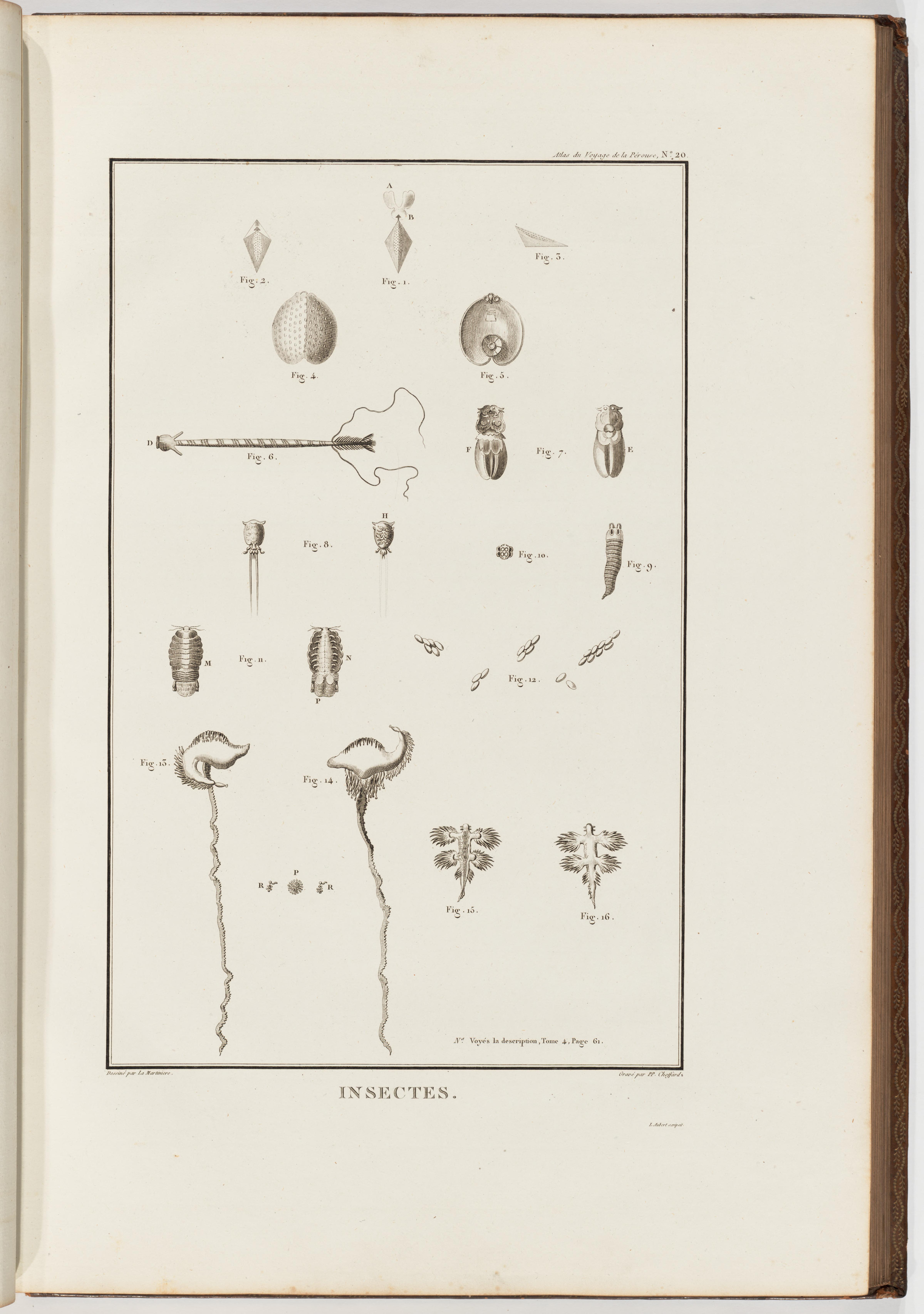 Voyage de La Pérouse autour du monde /publié conformément au décret du 22 avril 1791, et rédigé par L.A. Milet-Mureau.